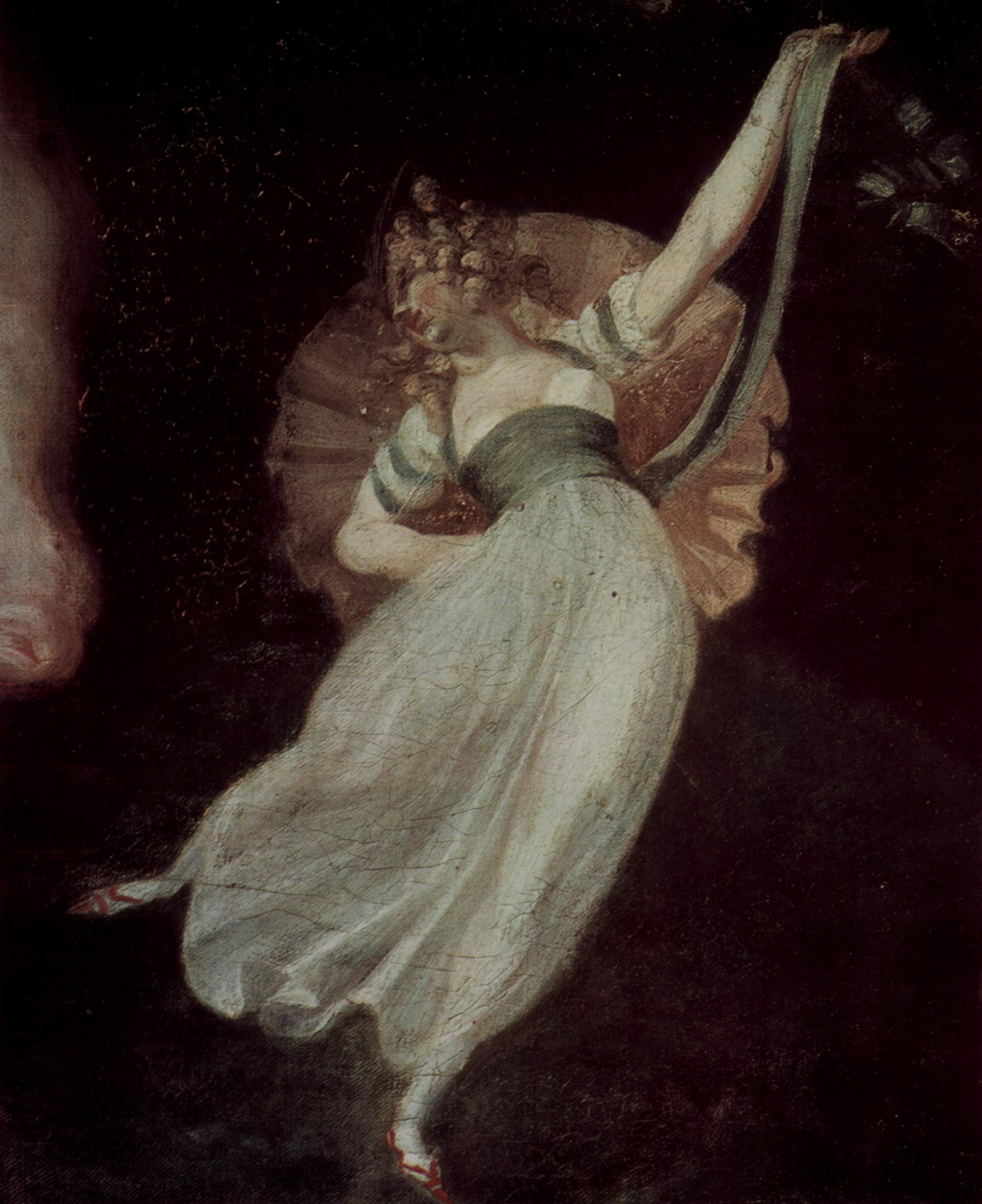 detail